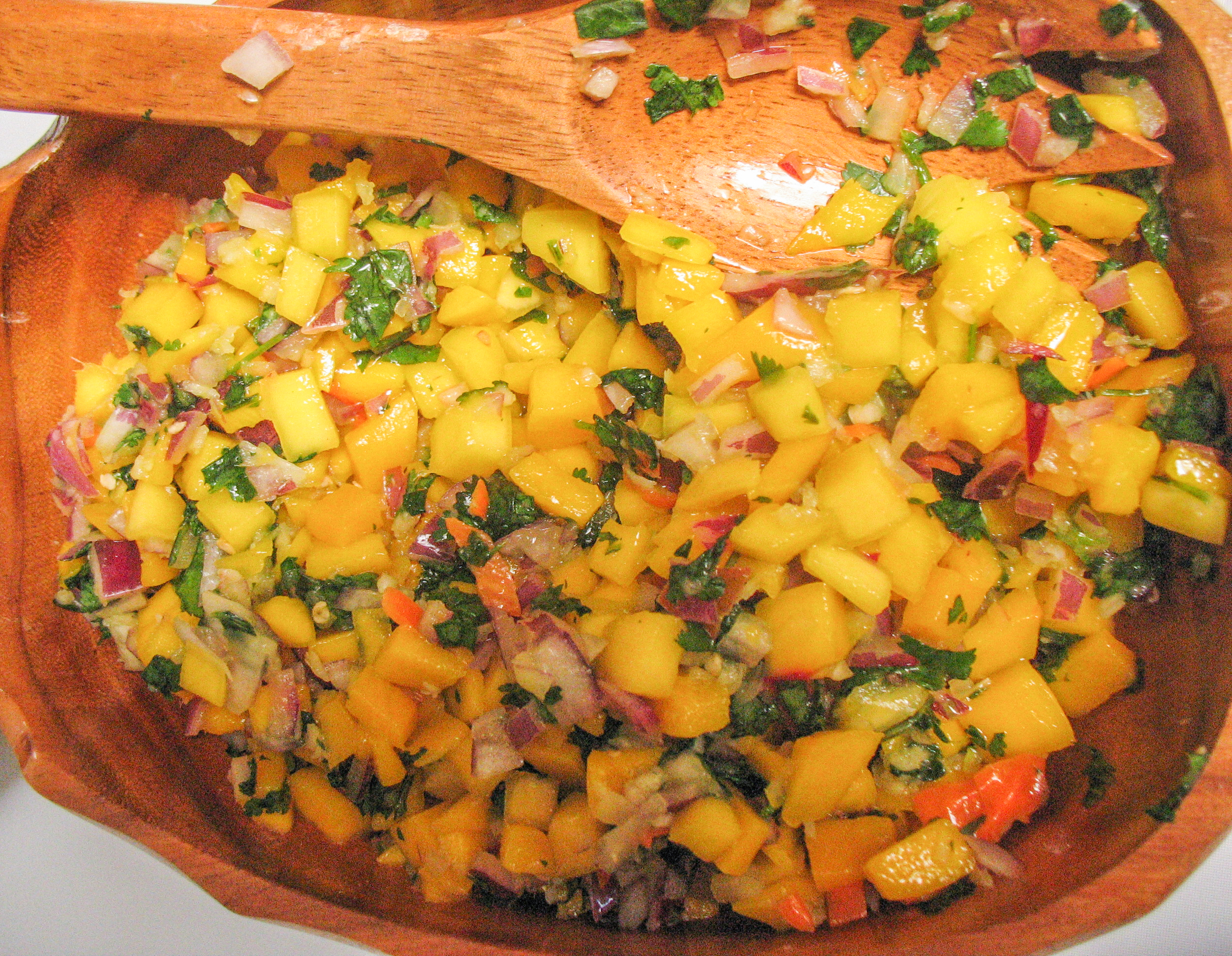 Mango salsa at Super Bowl party.